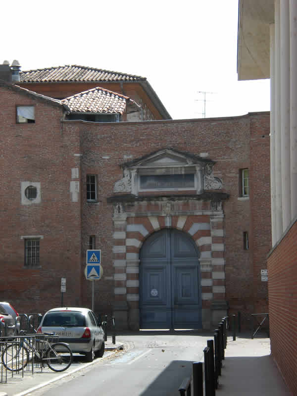 Académie de Toulouse. Ancienne entrée du rectorat.